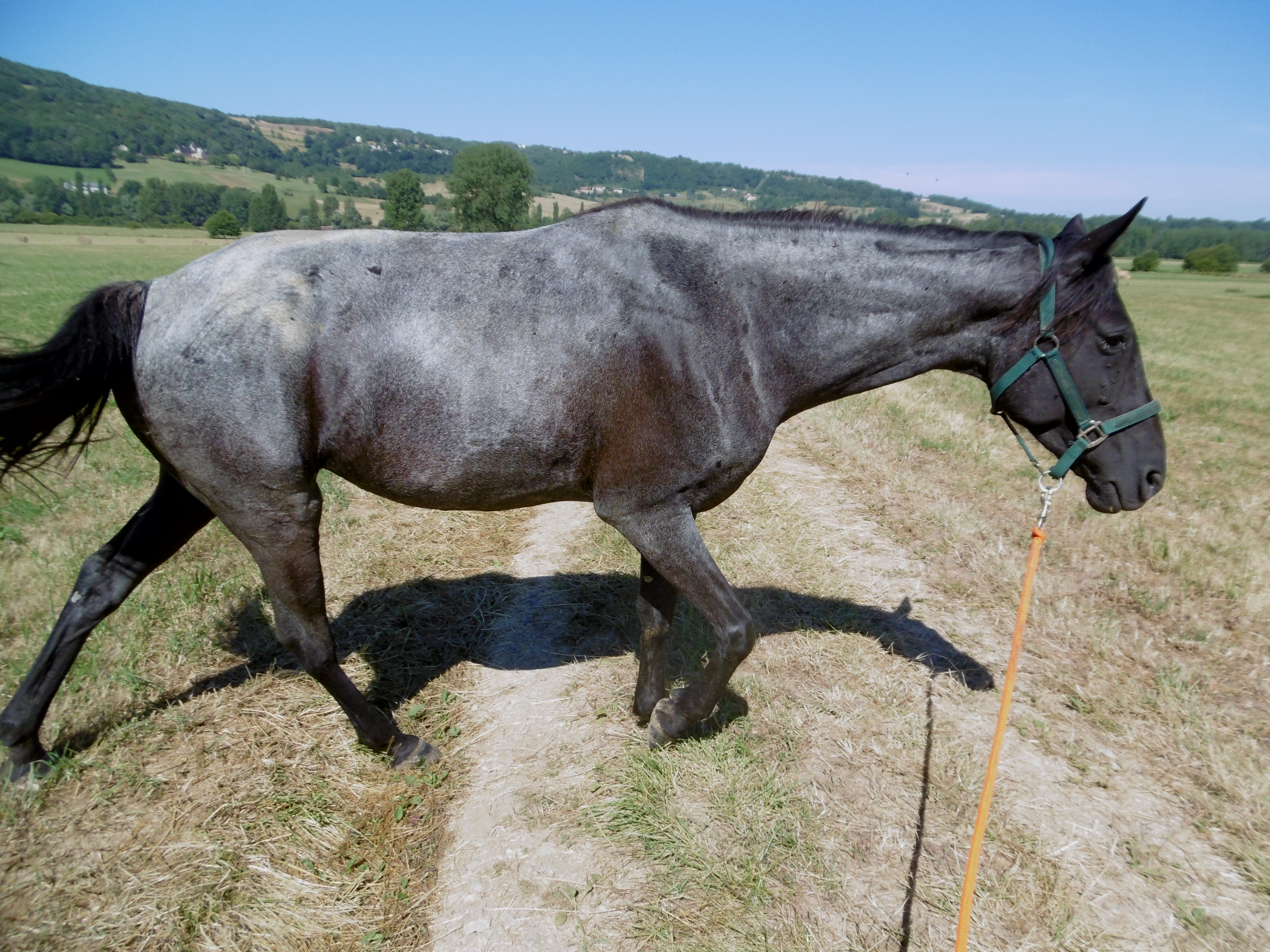 trotteur français, reflets argentés sous le soleil( alicia of night )